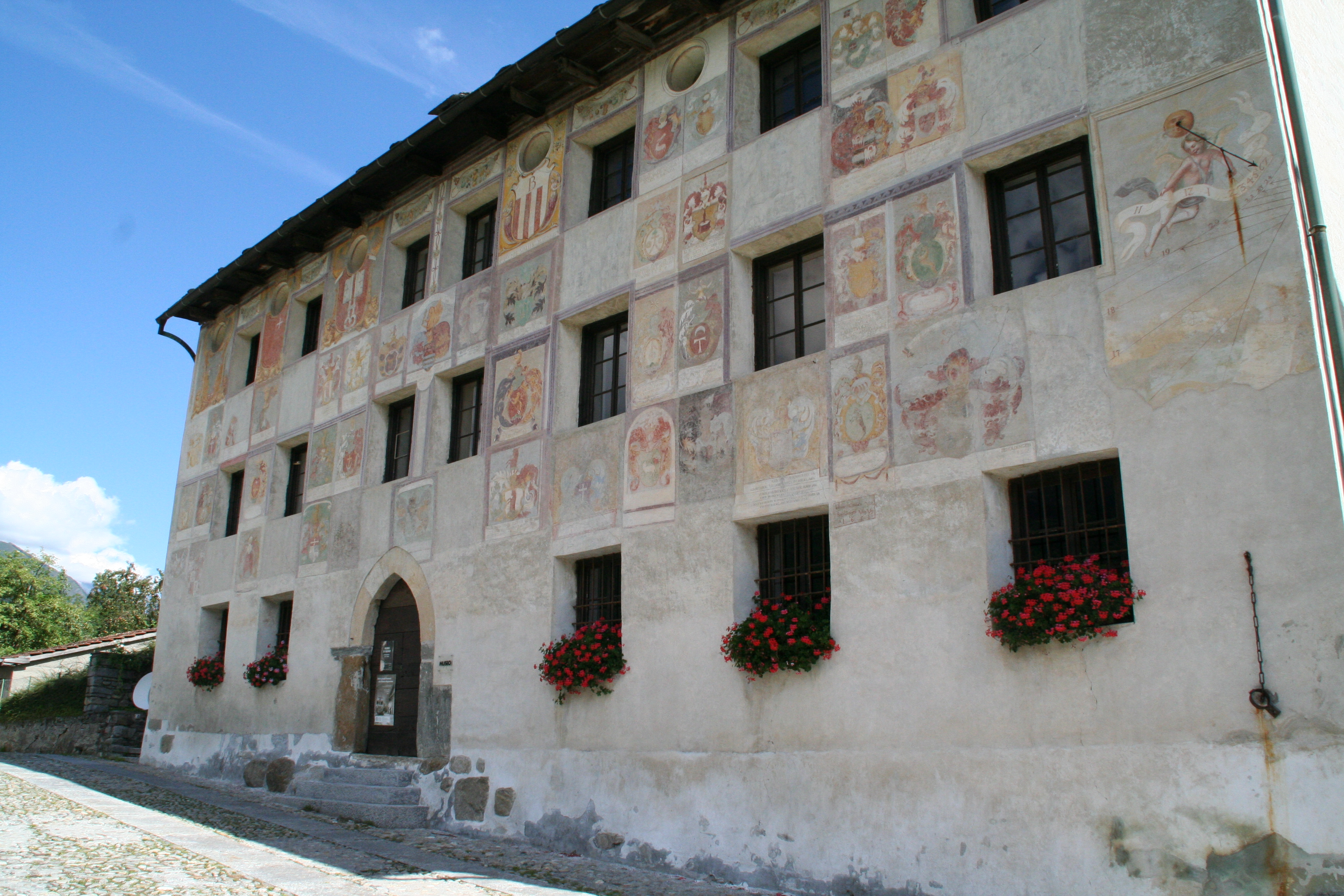 Lottigna, Casa Landvogti (Palazzo del Pretorio), Gde. Acquarossa